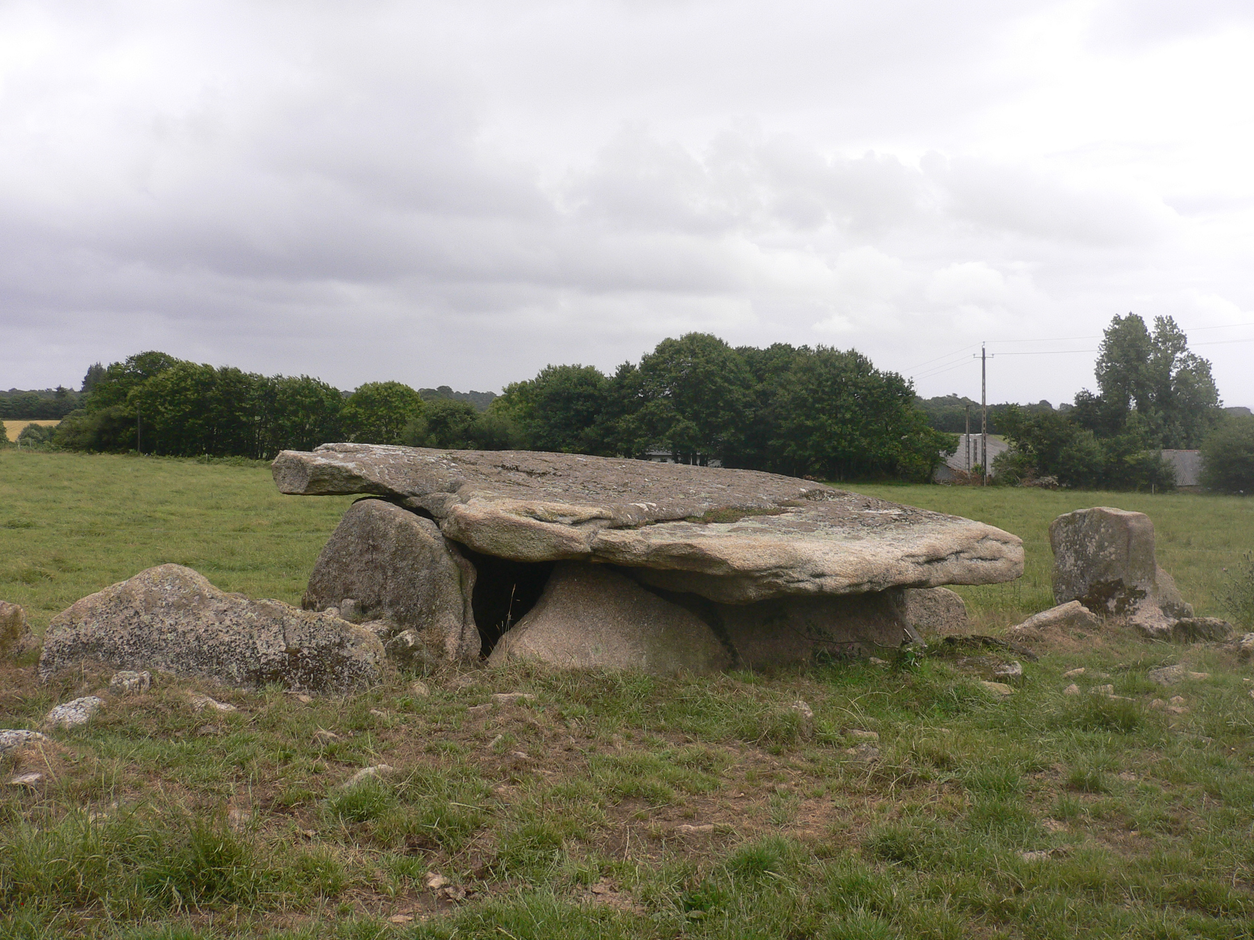 L 'Allée couverte de Kerviniou, situé sur la commune de Guiscriff, dans le département du Morbihan.